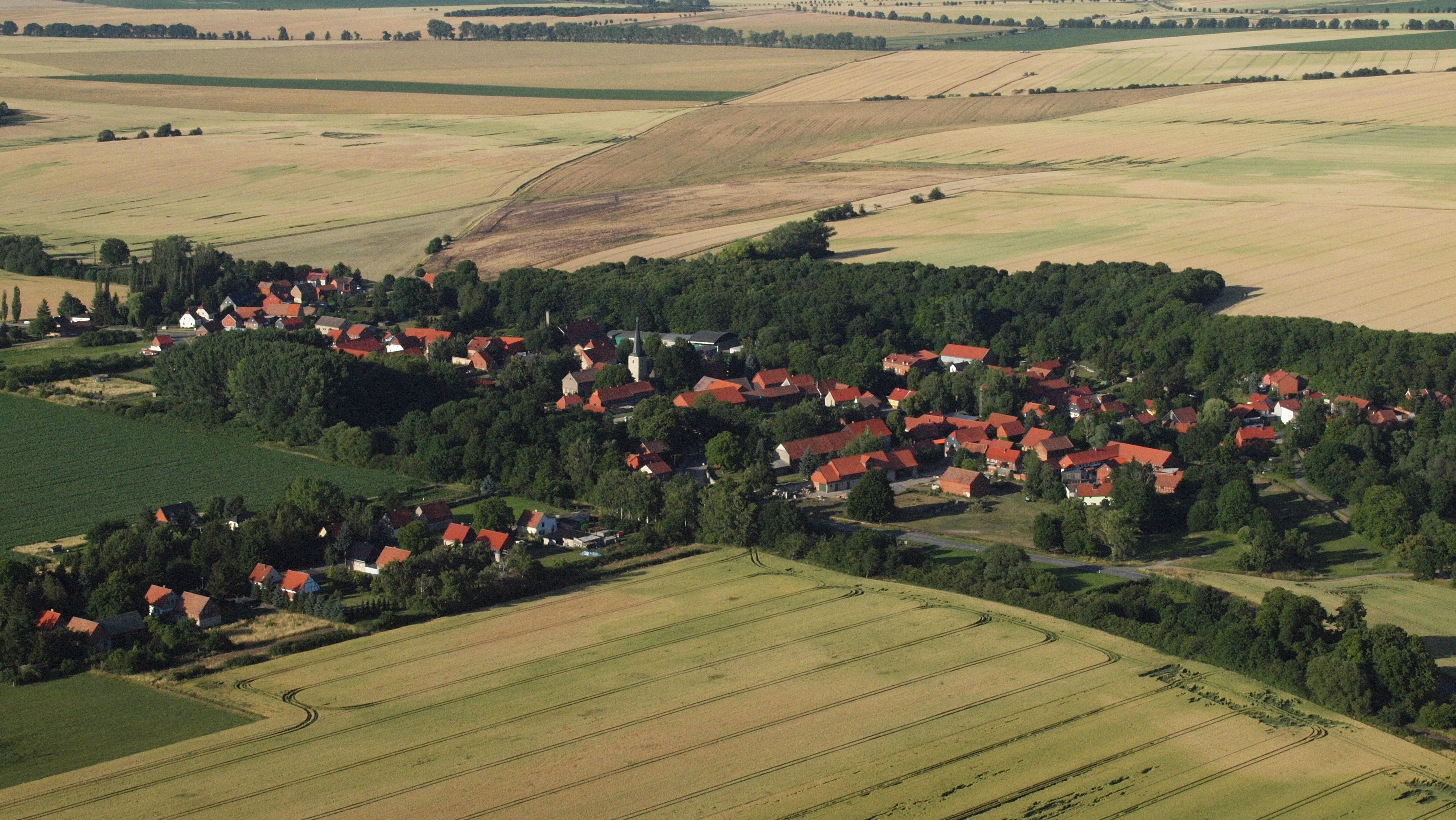 Vogelsdorf (Huy), Luftaufnahme (2015)